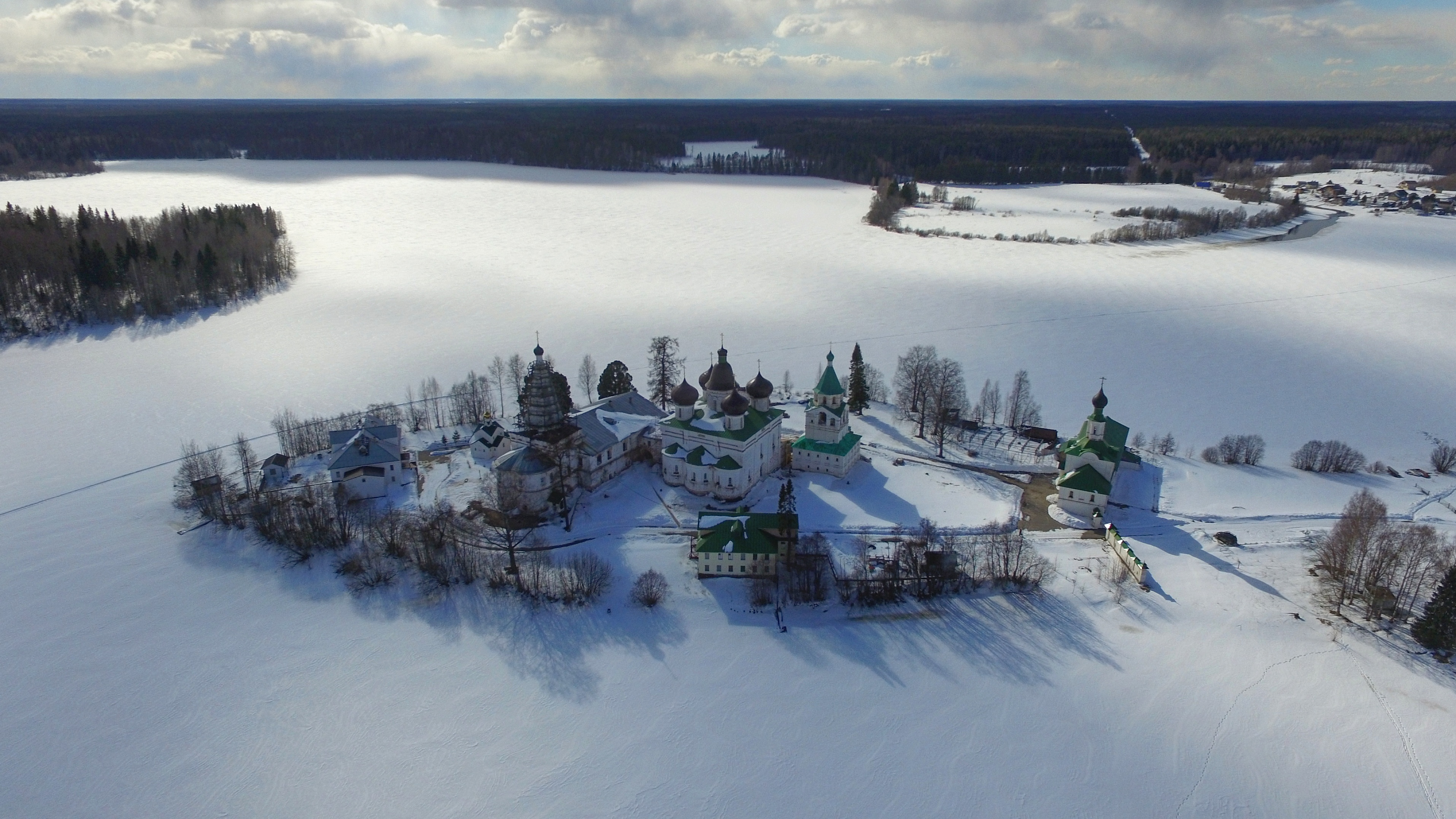 Свято-Троицкий Антониево-Сийский мужской монастырь